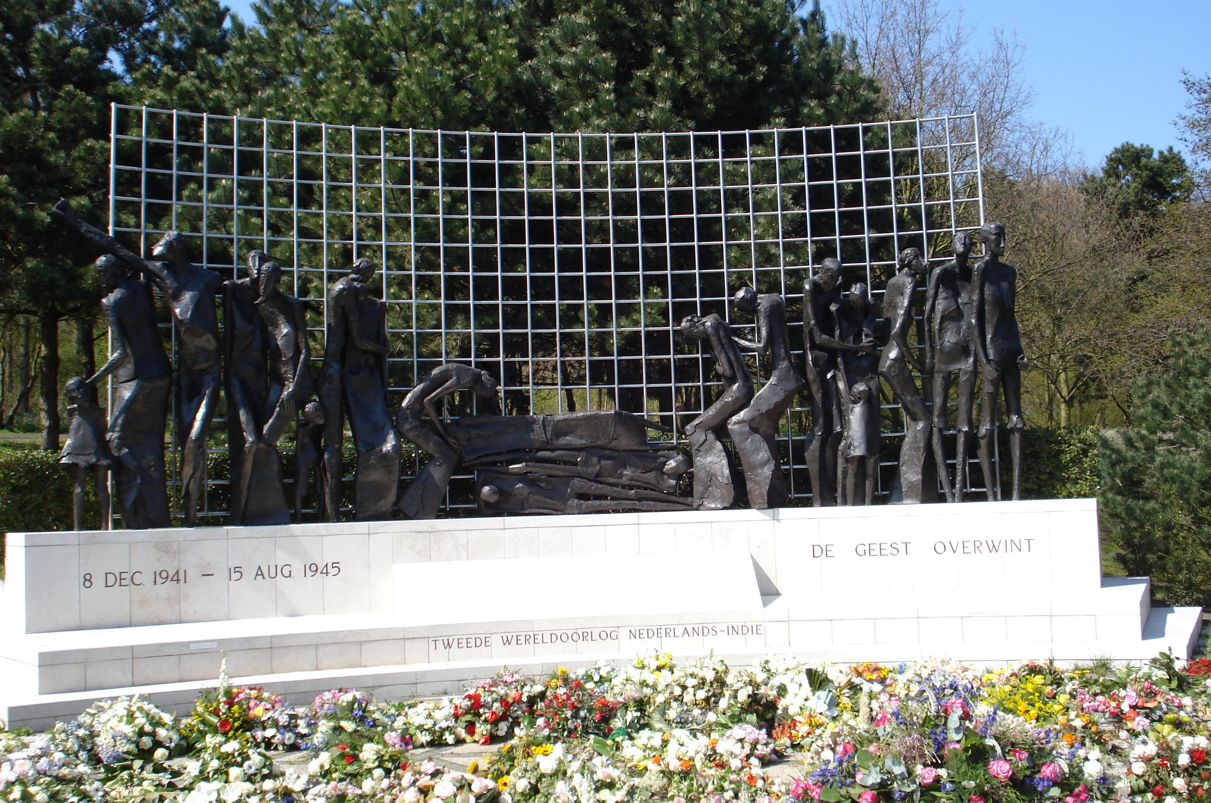 Den Haag, Prof. Teldersweg, Scheveningse Bosjes. Indisch monument van Jaroslawa Dankowa. 1989. The Hague/The Netherlands.